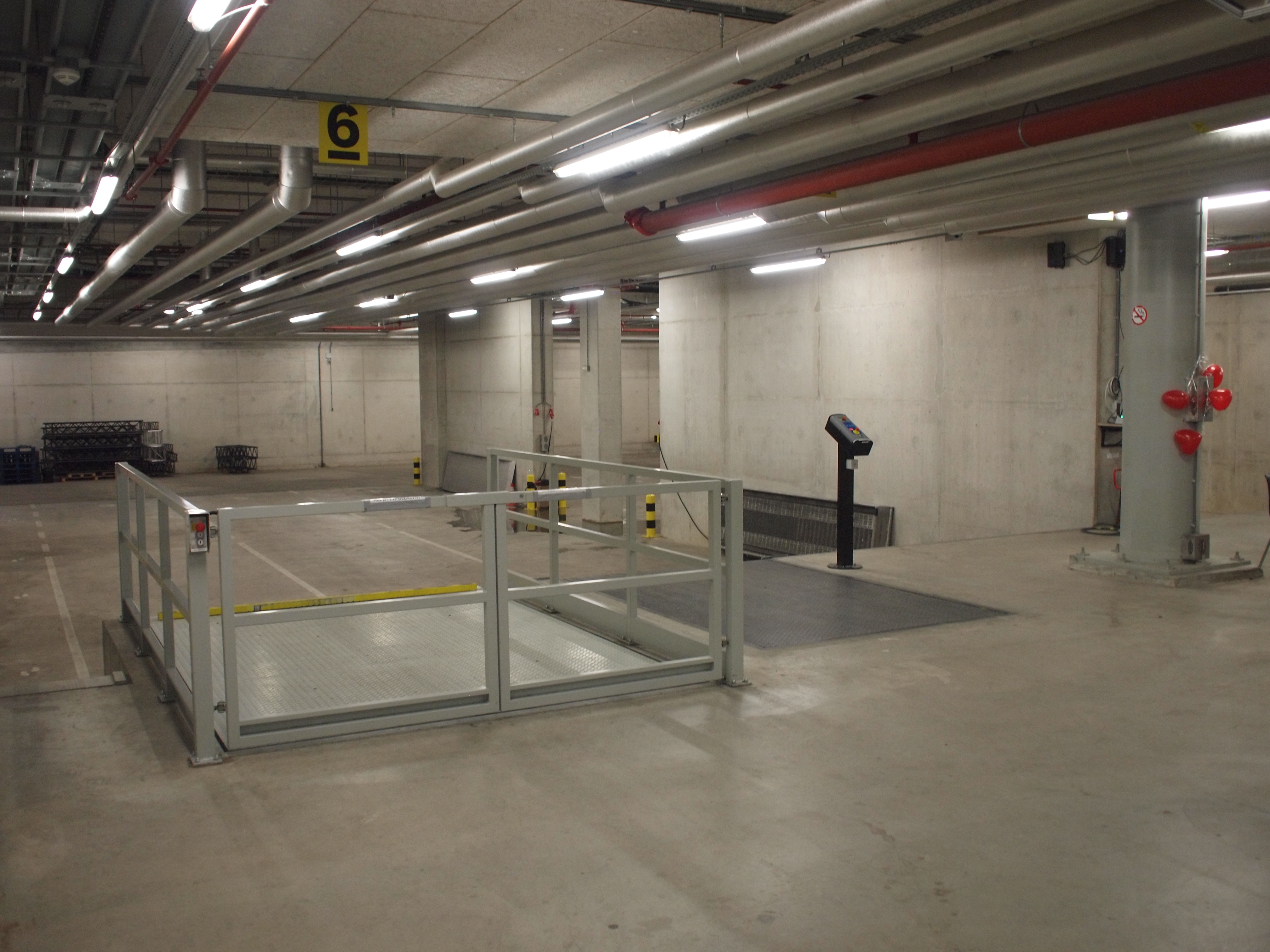 Expeditieruimte in TvoliVredenburg